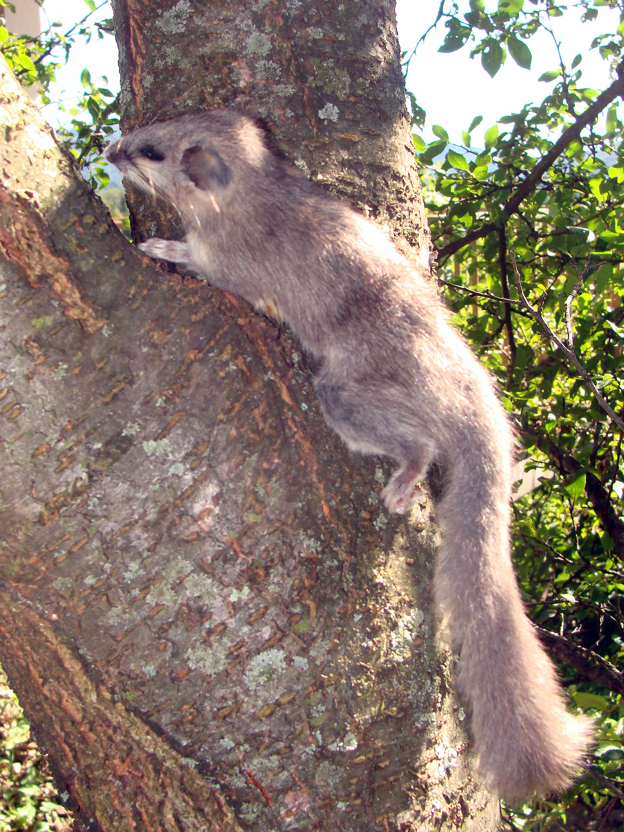 loir photographié sur un mirabellier à Monteaperta, commune de Taipana (province d'Udine en Italie en automne 2012.